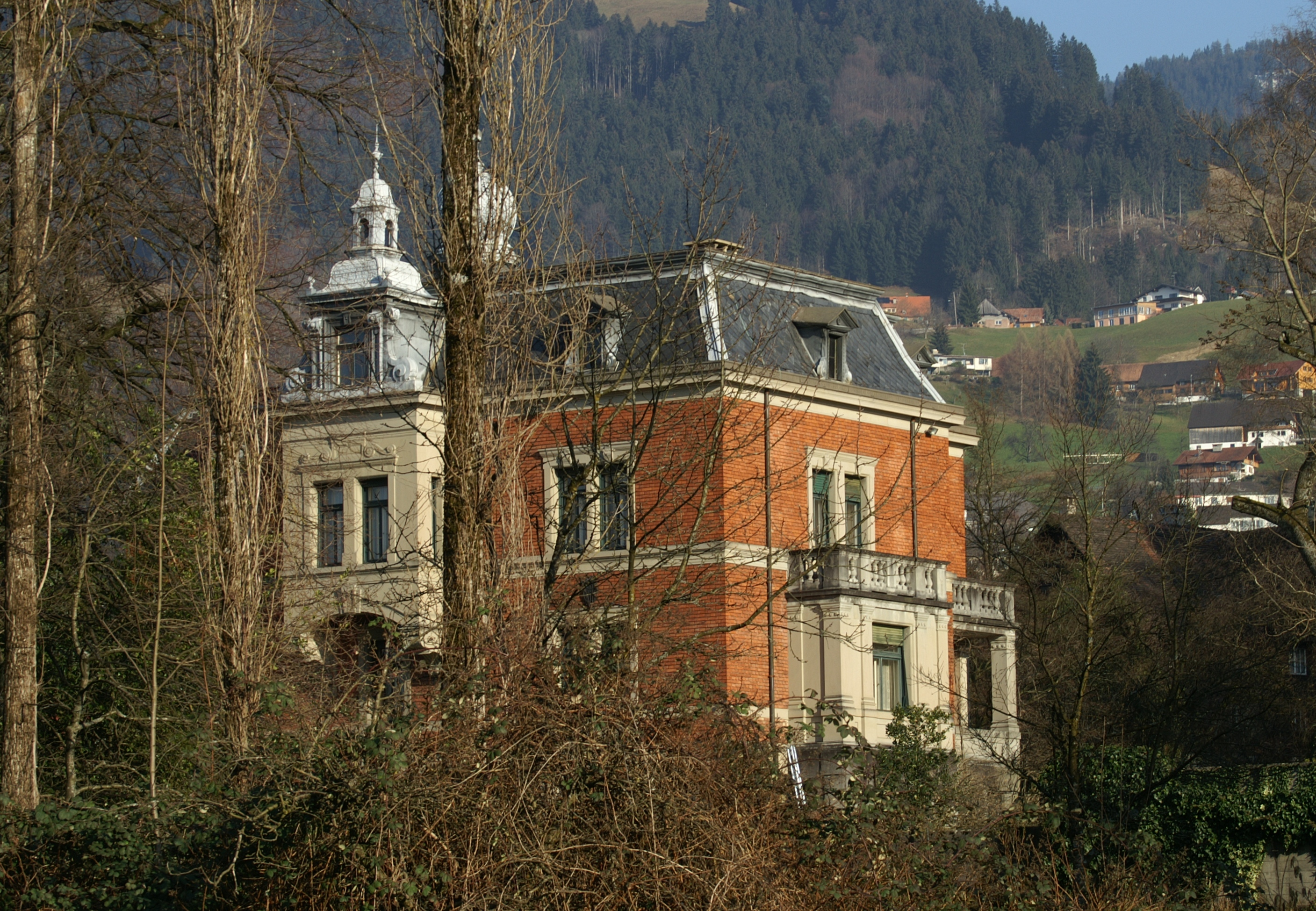 aus dem DEHIO Vorarlberg 1983: Dr.-Waibel-Strasse Nr.12: Wingathof. Erbaut E.19.Jh. Villa, in der Art französischer Gartenschlösser, in Park gelegen. Erker und Fensterrahmungen aus Sandstein, Erkerreliefs (Putten, Symbole von Handel und Industrie, Büsten), Mansarddach mit Gaupen. Rückseitig Wirtschaftsgebäude in Backstein; Pavillion, Backstein, Turm. In Dornbirn, Oberdorf. Dr. Renate Madritsch, Landeskonservatoriat für Vorarlberg Dornbirn, Dr. Waibelstraße 12, Auch diese Villa ist von einem Sohn des Franz Martin Hämmerle, nämlich Otto, 1873 erbaut und 1893 erweitert worden. Otto Hämmerle studierte in Manchester und Liverpool, daher auch die englische Bauweise in Sichtziegelmauerwerk. Baumeister J.A. Albrich und Josef Schöch (1893) waren hier tätig. Auch diese Villa wird noch von den Nachkommen bewohnt und gepflegt.